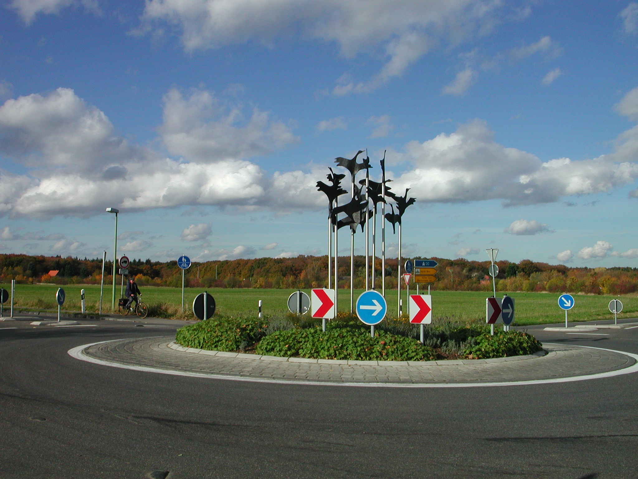 Der Kreisverkehr am Ortsrand im Osten von Nörvenich